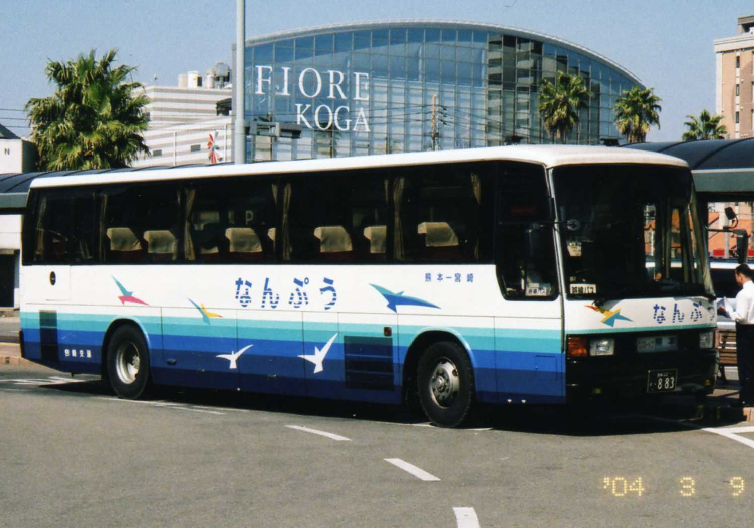 Miyazaki Kotsu Bus Mitsubishi P-MS725S 2004.03.09 at Miyazaki Sta. Photo by Cassiopeia_sweet.